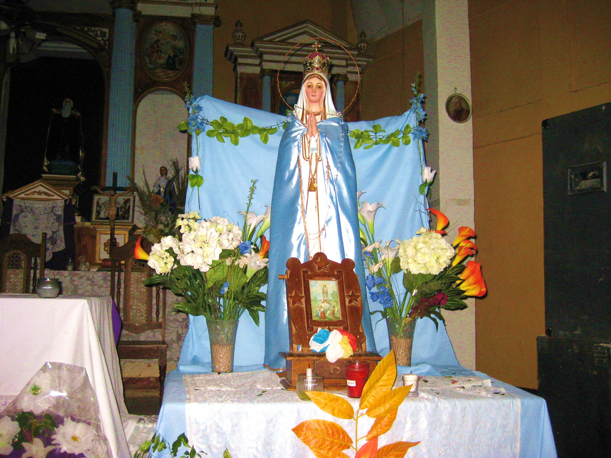 La replica de la Virgen Inmaculada de la Concepcion en la Parroquia San Caralampio.